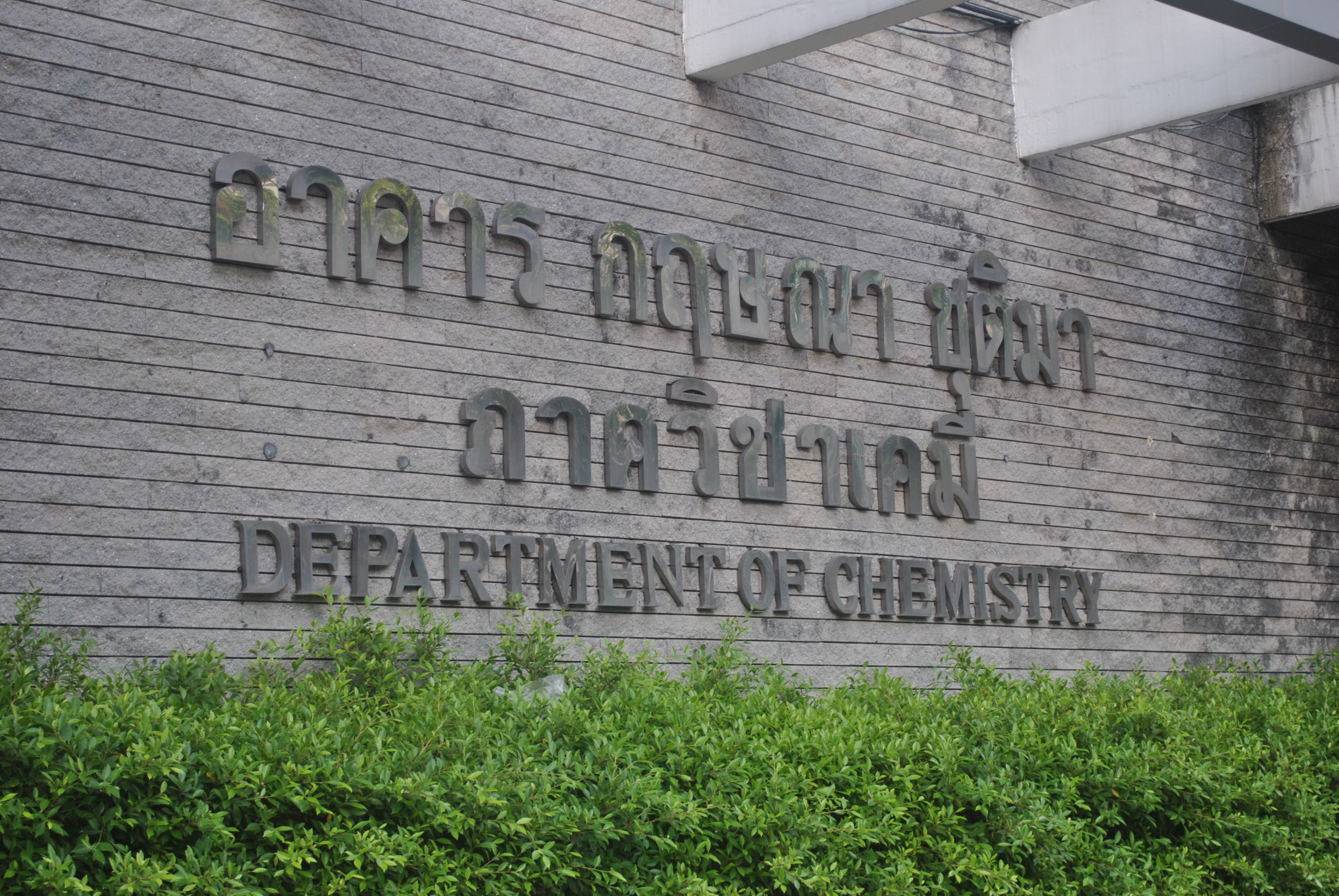 ส่วนหน้าของอาคารกฤษณา ชุติมา (ตึกเคมี)